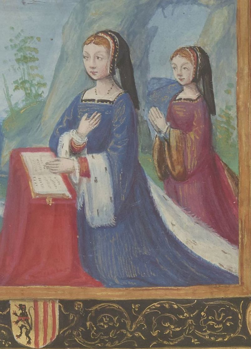 Miniature de Catherine d'Amboise et de sa nièce Antoinette d'Amboise (1530)